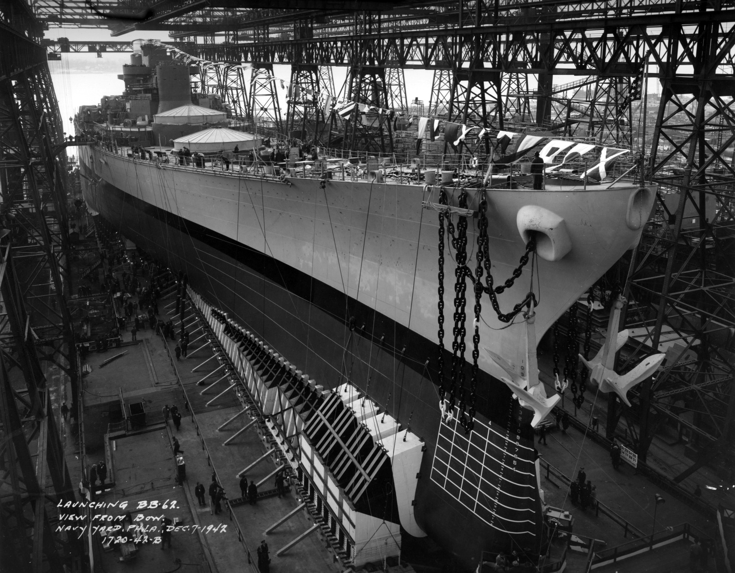 Launch of USS New Jersey